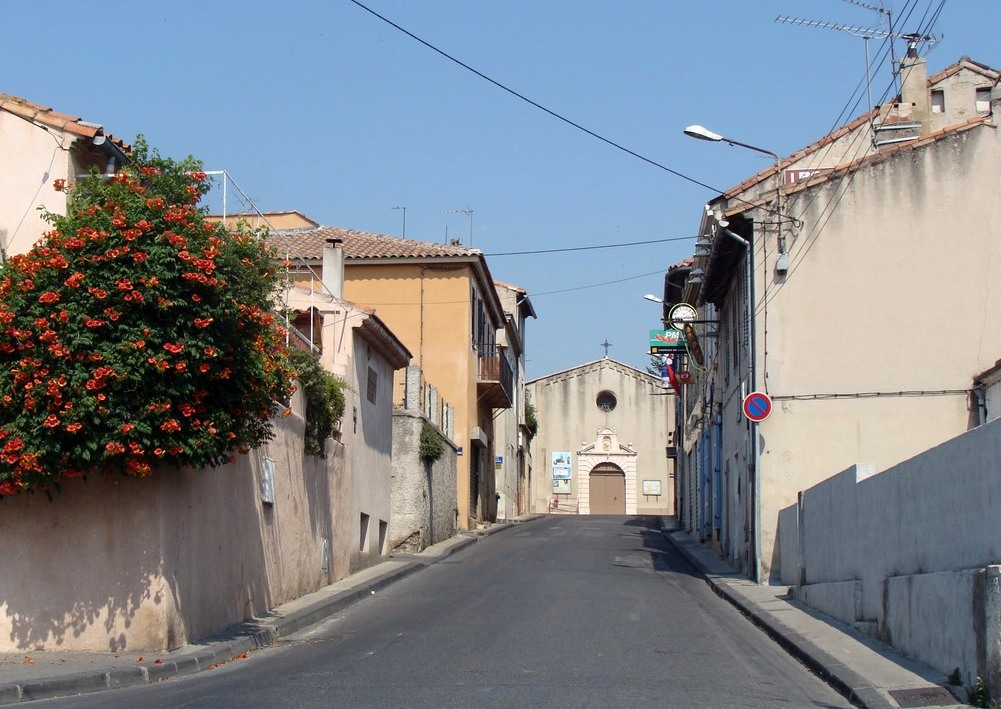 Quartier des Caillols à Marseille : la grand-rue et l'église